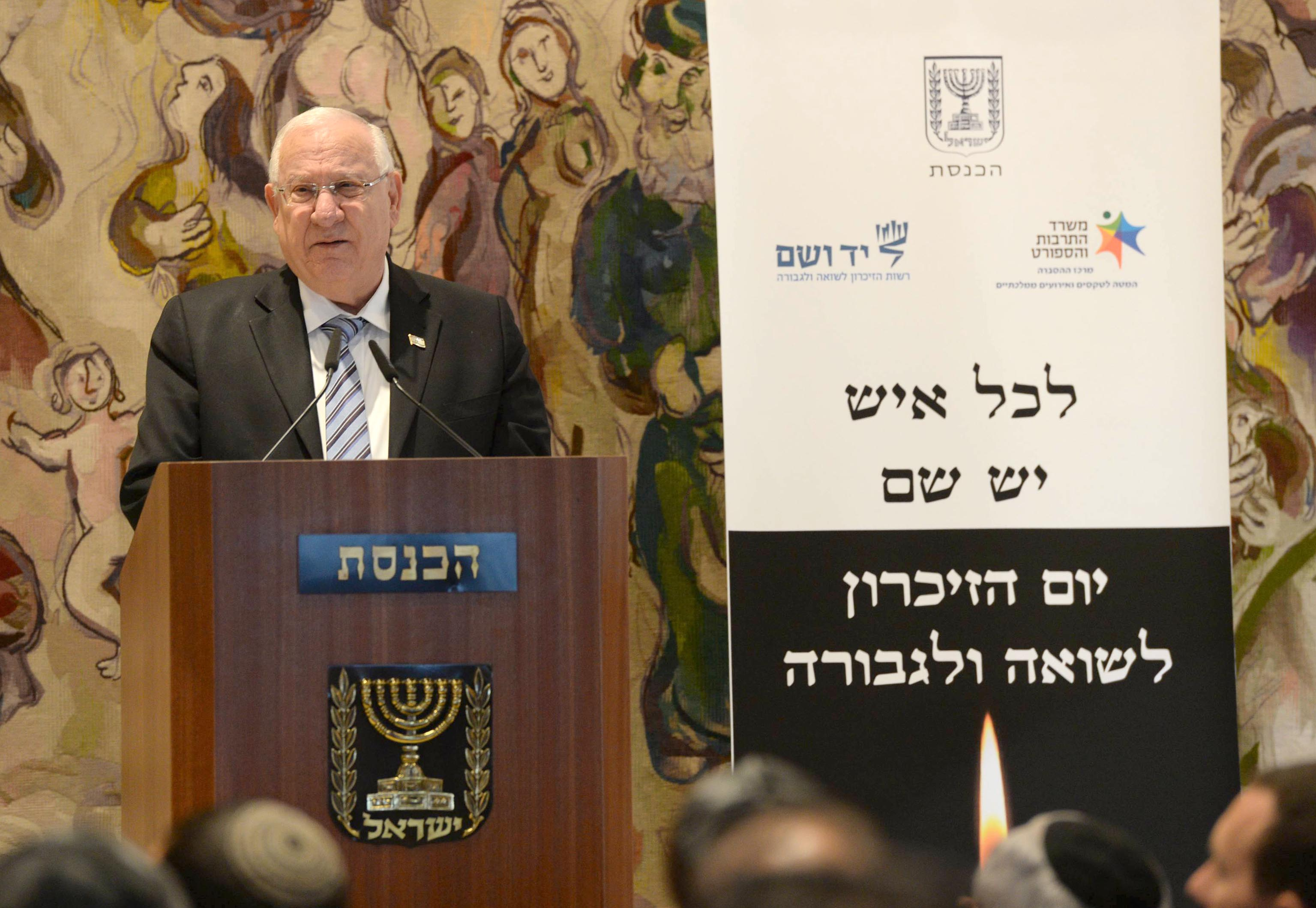 לכל איש יש שם" הוא שמו של מפעל ההנצחה של מוסד יד ושם, לתיעוד שמות הנספים בשואה. נשיא מדינת ישראל ראובן ריבלין נושא דברים בטקס. הטקס השנתי בכנסת